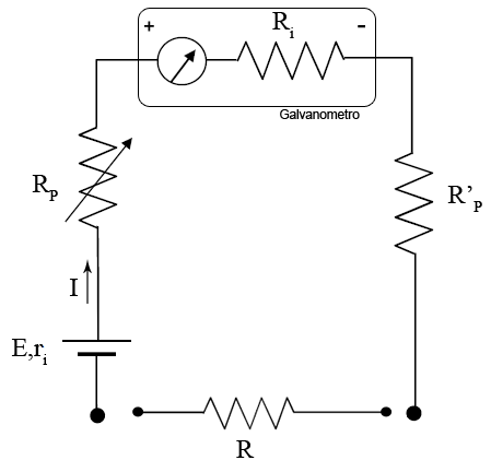 Cirucito de un ohmetro